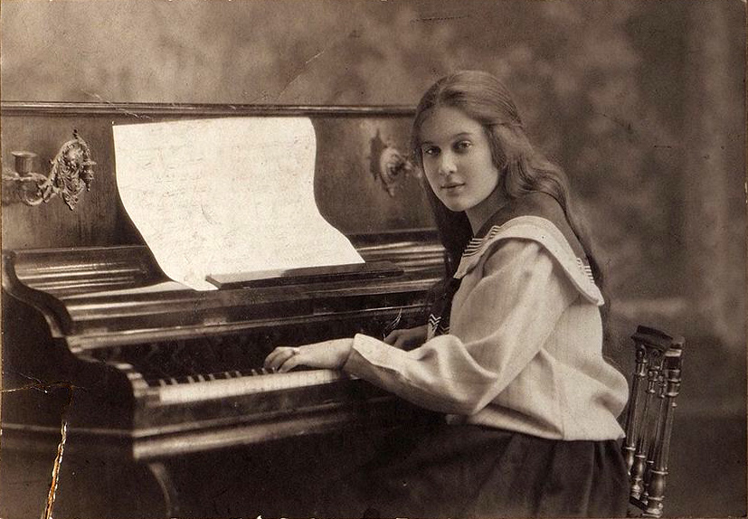 Люба Орлова в 1916 году. фот. Г. Трунов. М., [1919]. 9,8 х 14,2 см. Утрата фрагментов паспарту, реставрация. На паспарту надпись рукой Любови Орловой: «Прошу беречь это фото / доброго здоровья".